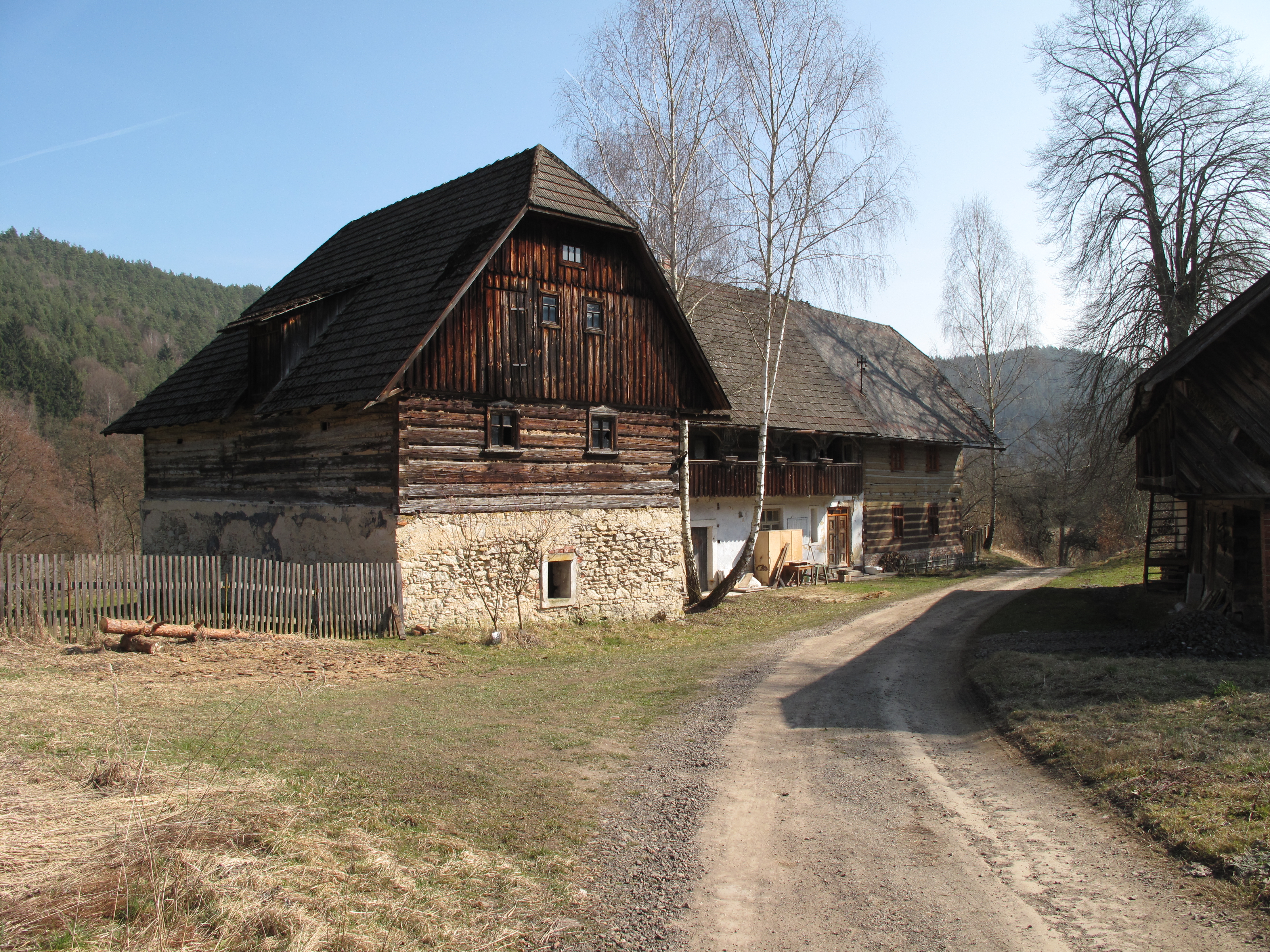 Roubenka v Janovicích. Okres Liberec, Česká republika.